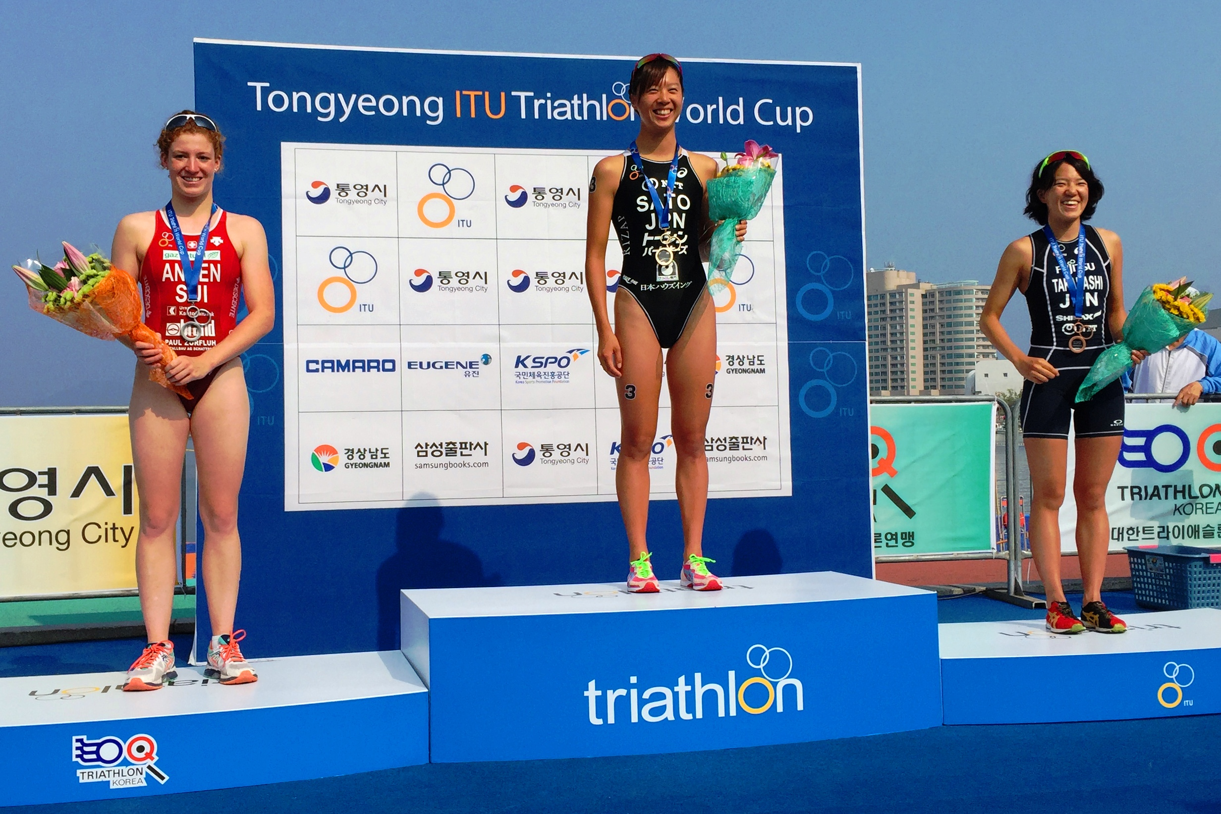 Jolanda Annen (CHE), Yuka Sato (JPN) und Yuko Takahashi (JPN) am Triathlon Weltcup Tongyeong 2015